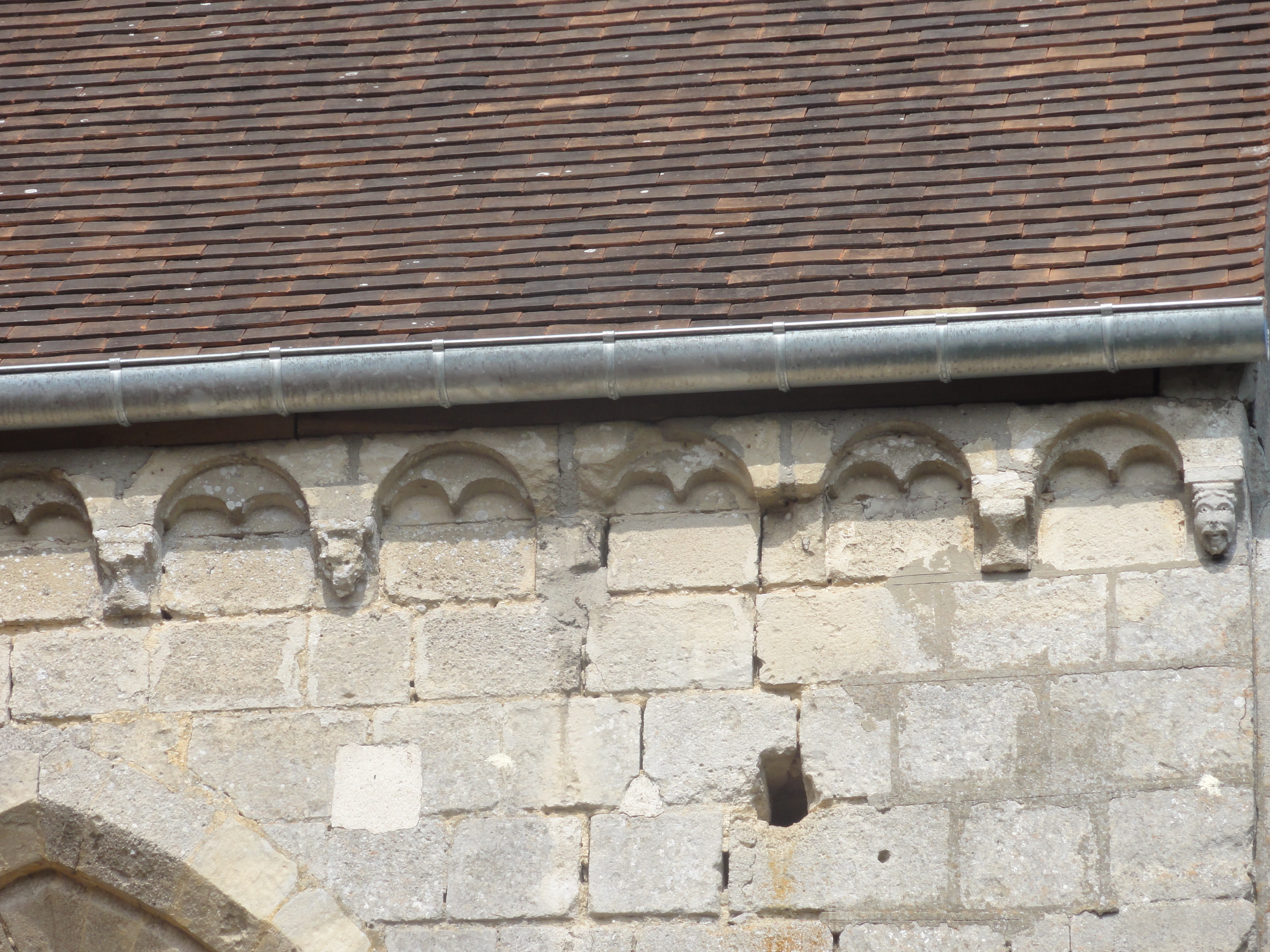 Corniche beauvaisine sur l'abside, côté sud.